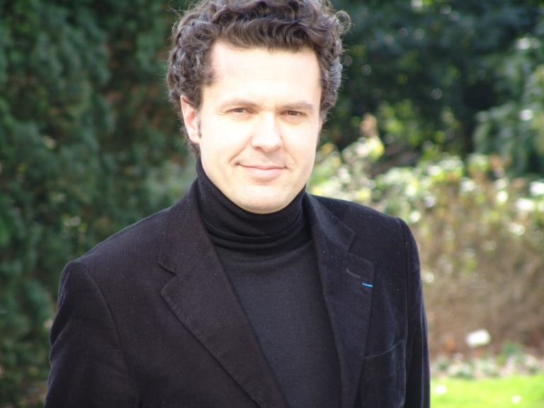 Portrait de l'homme politique Christophe Béchu le 3 mars 2009.